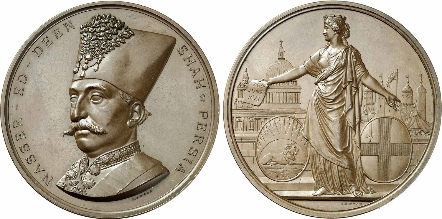 مدال برنز سفر ناصرالدین شاه به انگلستان